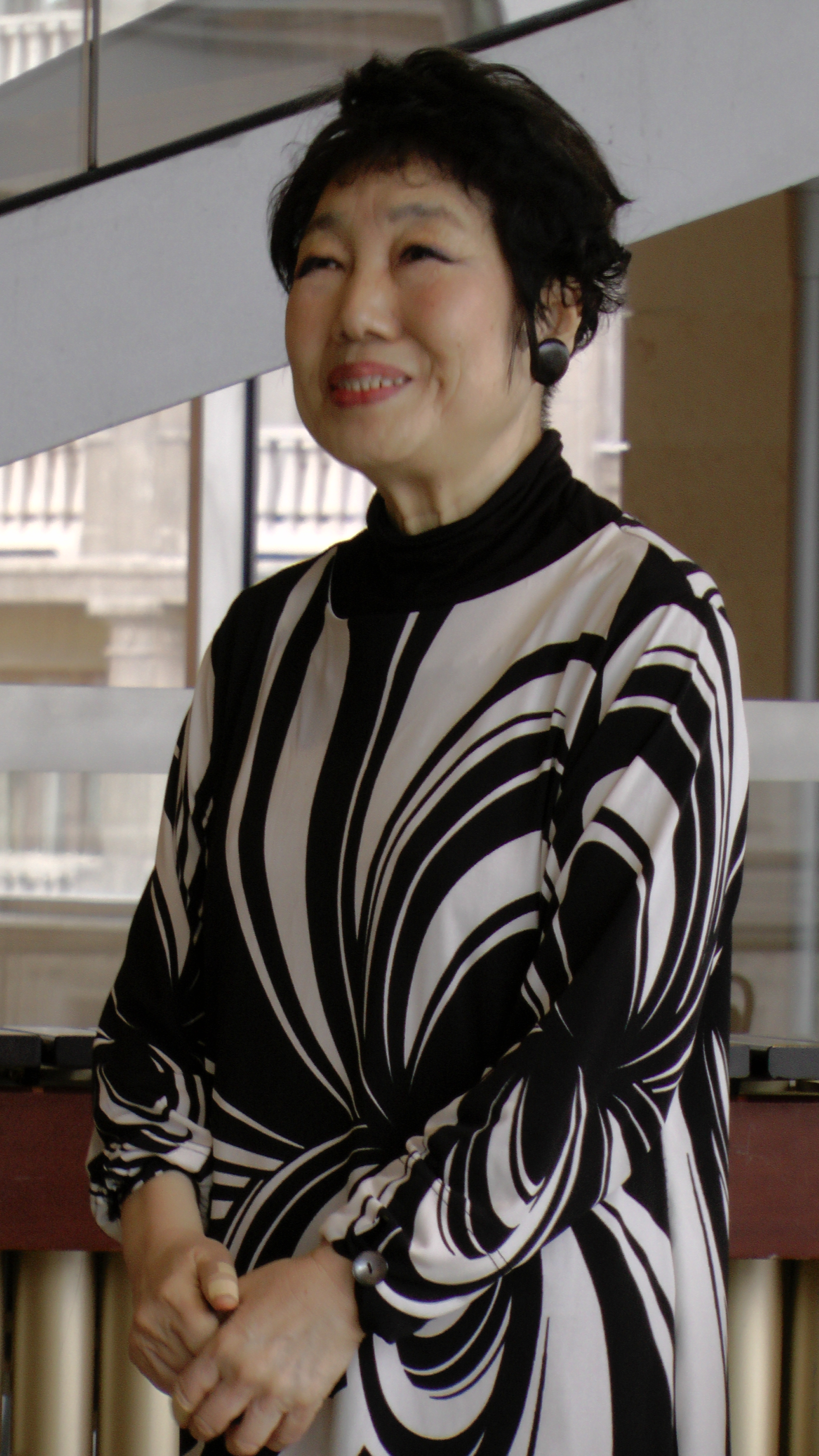 Кэйко Абэ в Санкт-Петербурге. 8.06.2016.